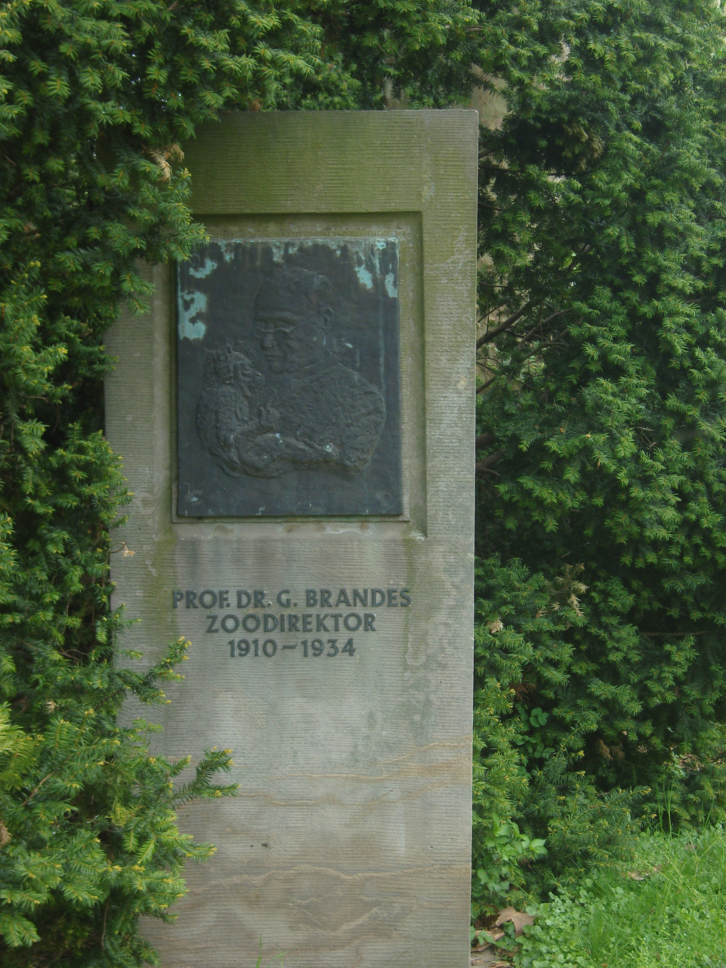 Gedenkstele für Professor Brandes im Zoo Dresden